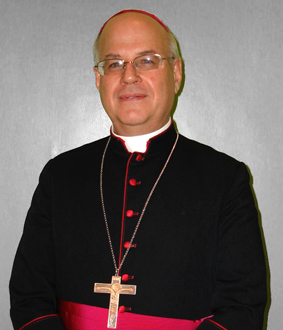 Mons. Enrique Pérez Lavado